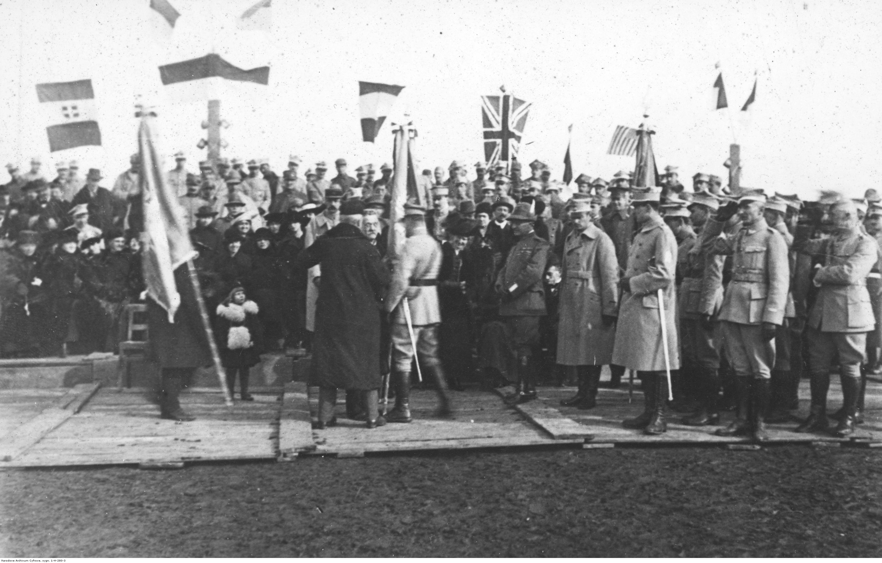 Polski obóz wojskowy w La Mandria di Chivasso - uroczystość wręczania sztandarów pułkowi im. Garibaldiego przez przedstawiciela Mediolanu; 15 marzec 1919 r. Koncern Ilustrowany Kurier Codzienny - Archiwum Ilustracji. Sygnatura: 1-H-280-3